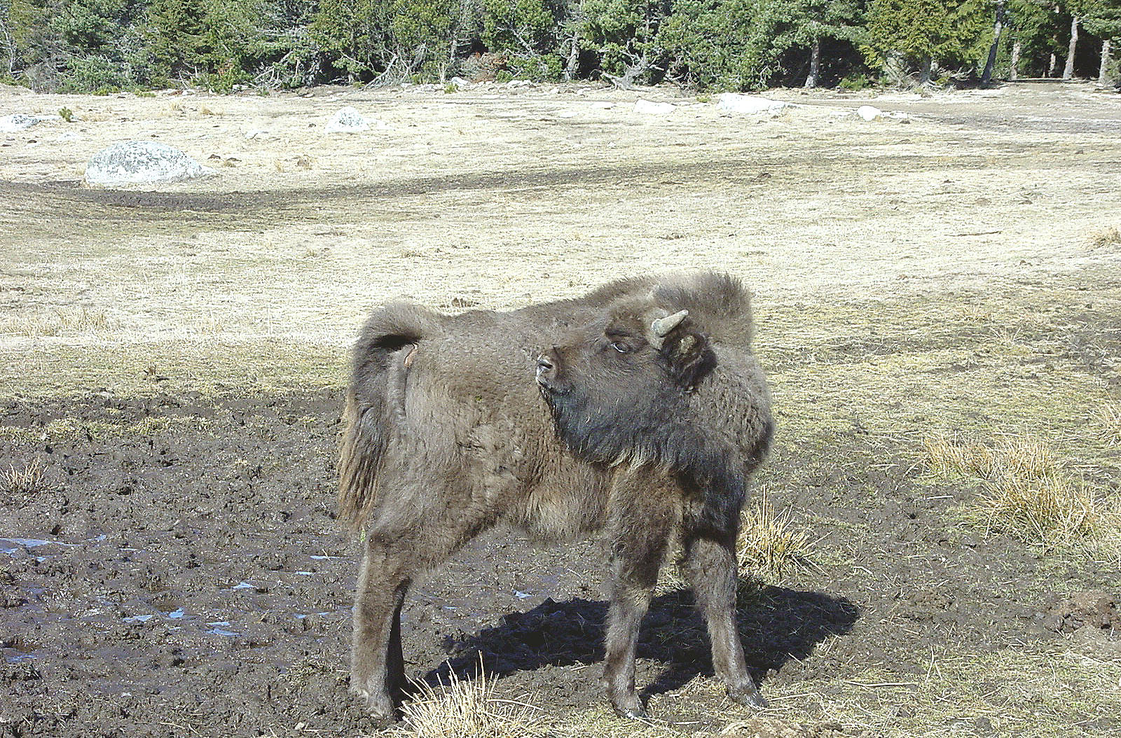 jeune bison issu de bisons polonais réintroduit en semi liberté en France (Margeride, Lozère).